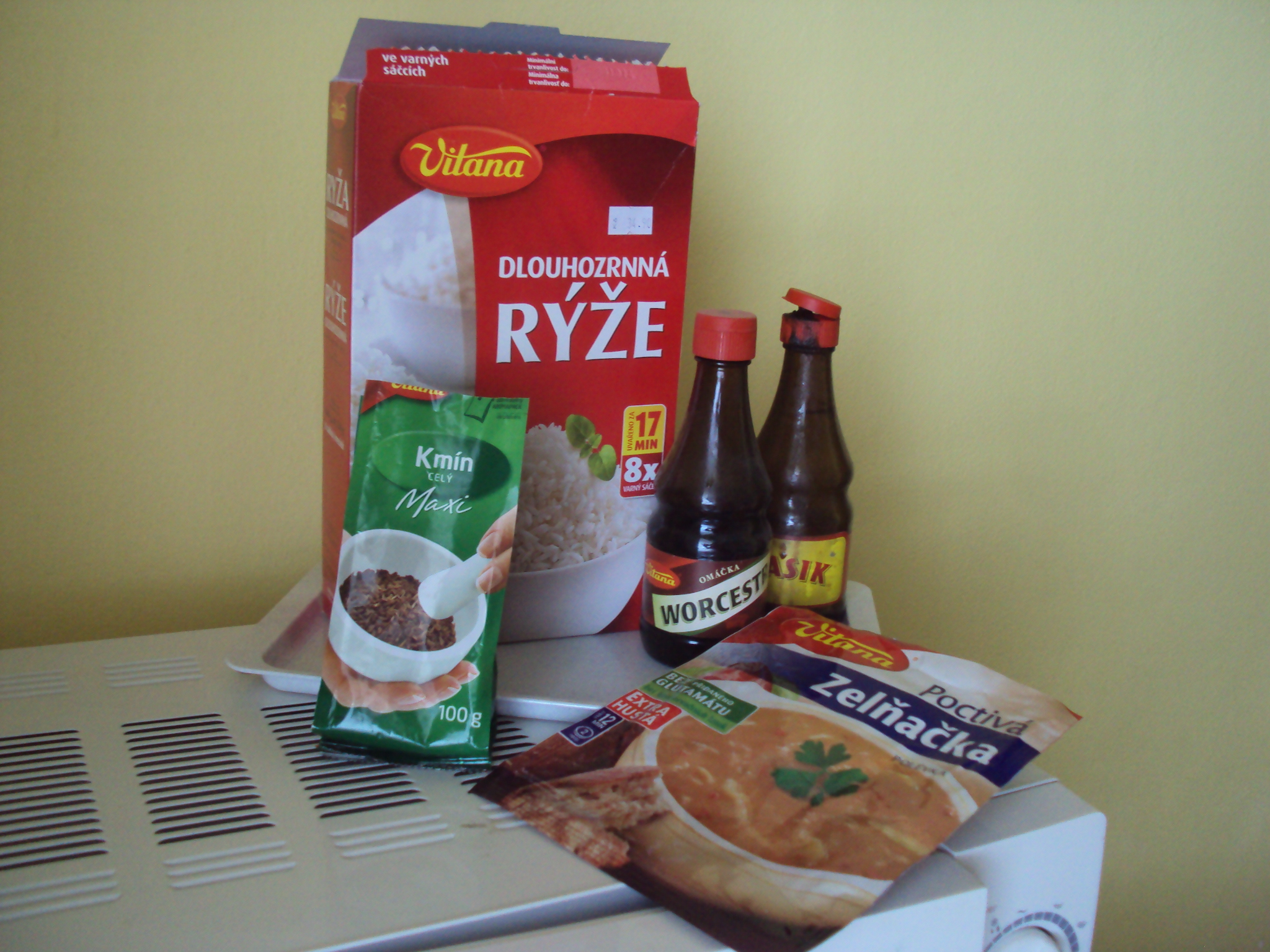 Česky: Část sortimentu firmy Vitana Byšice